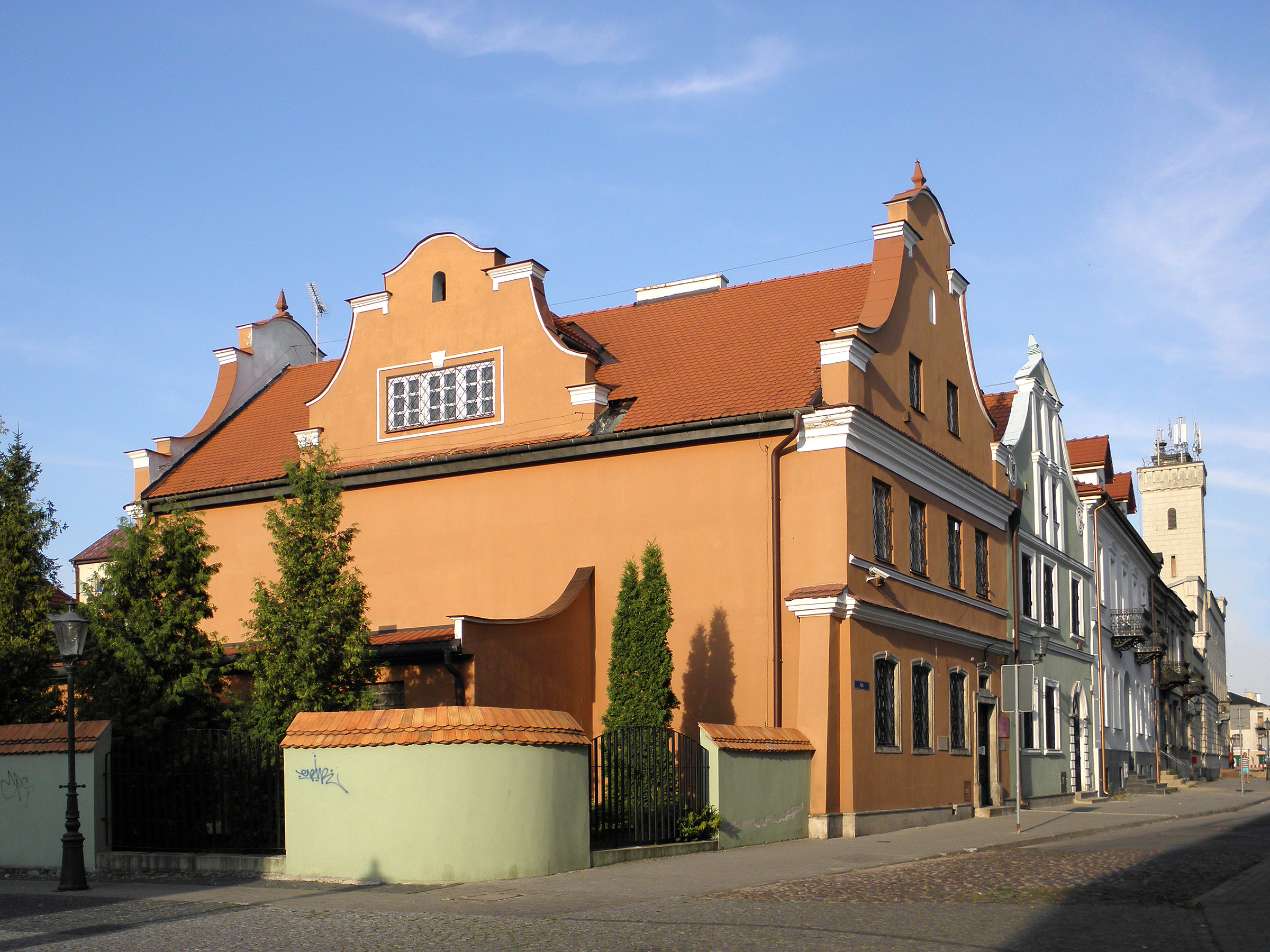 Radom - kamienice Gąski i Esterki, widok z ul.Szpitalnej.